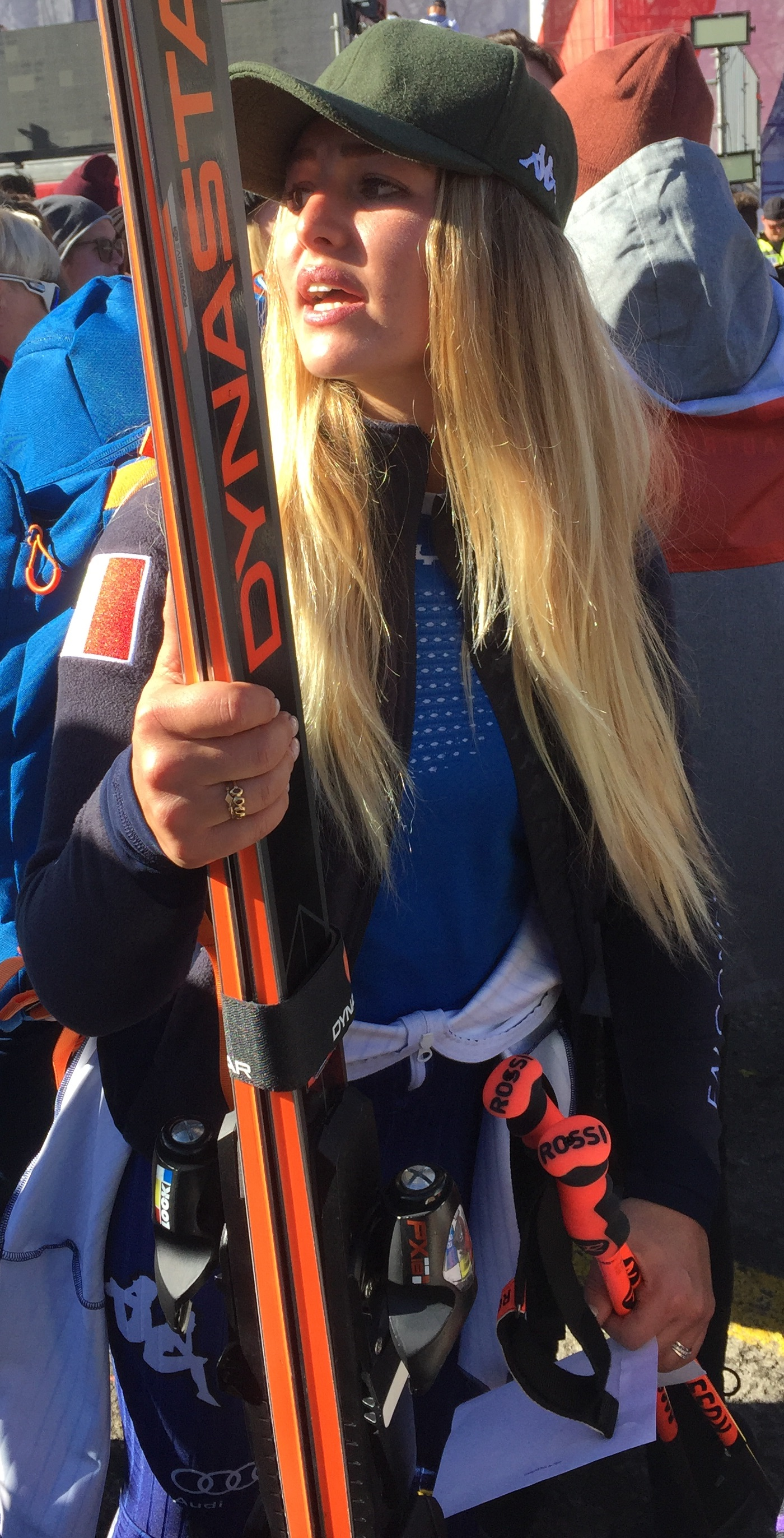 La sciatrice italiana Roberta Melesi a Soelden nel 2019